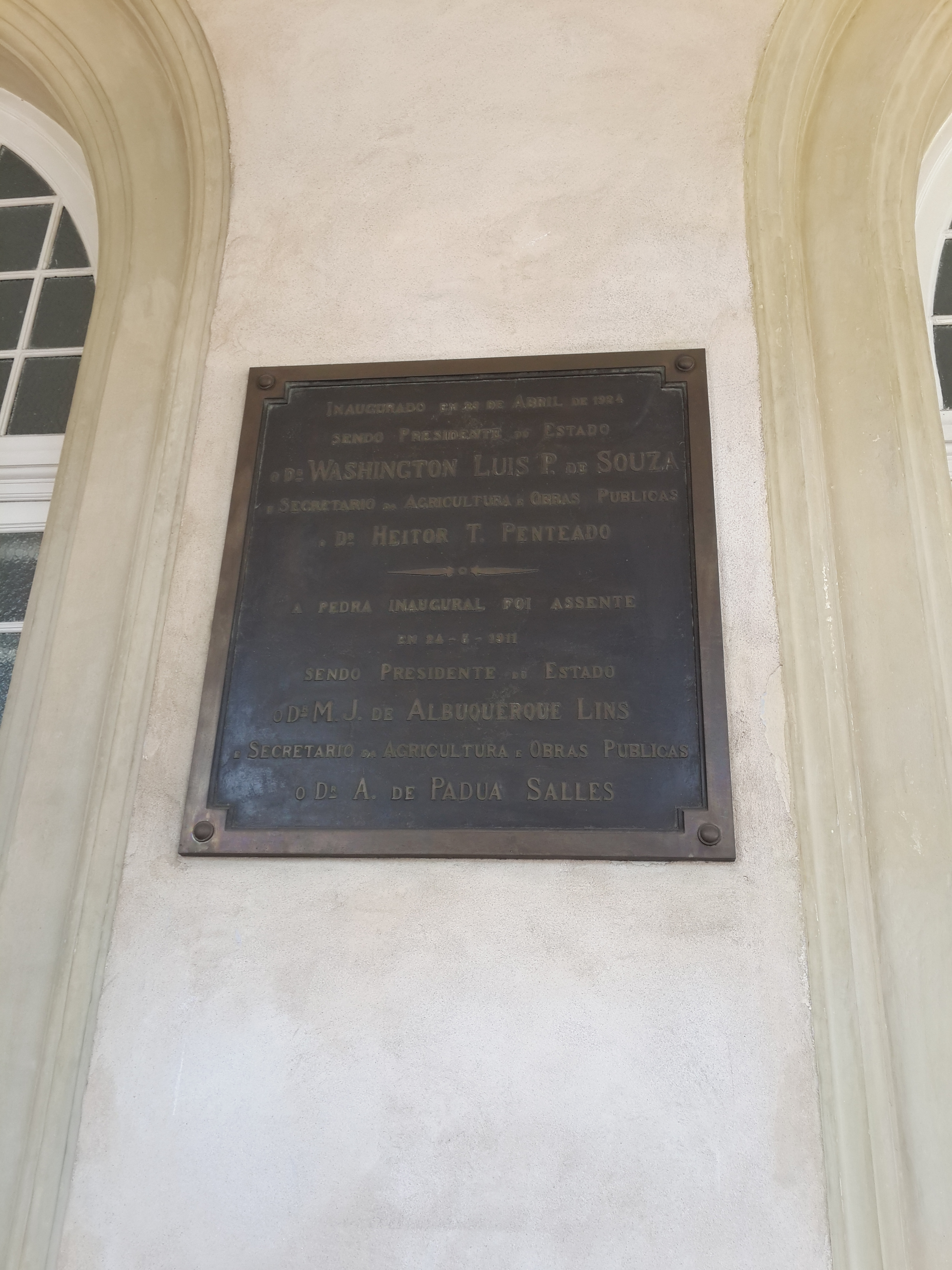 Placa afixada na parte de dentro do prédio, contendo informações sobre a inauguração do Palácio das Indústrias, em São Paulo (SP), Brasil.